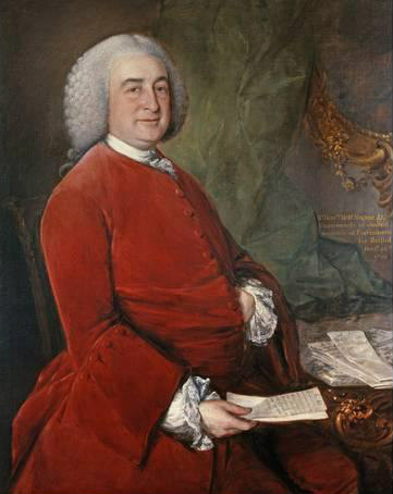 Lord Nugent